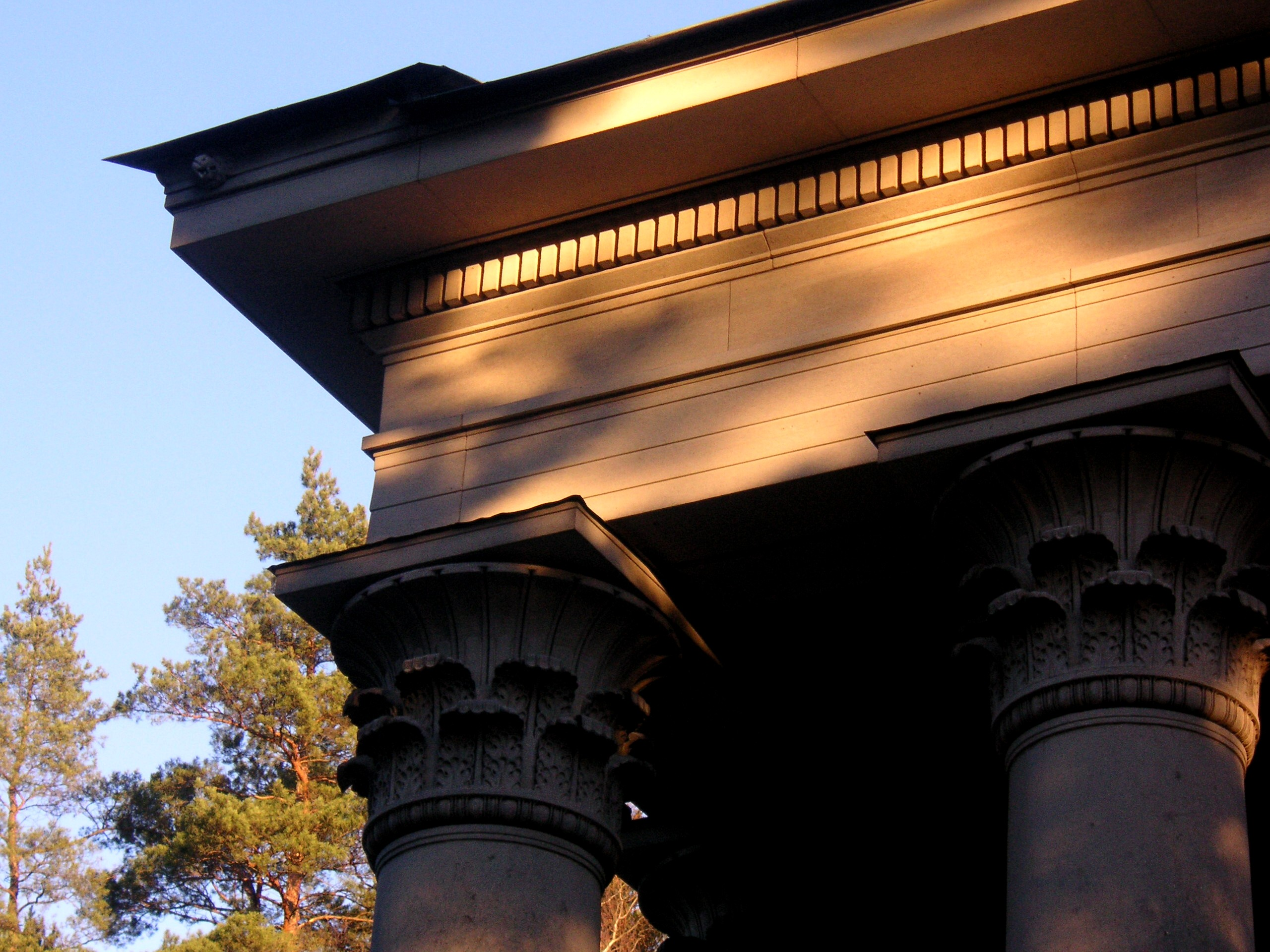 Sigurd Lewerentz, Uppståndelsekapell på Skogskyrkogården, detalj